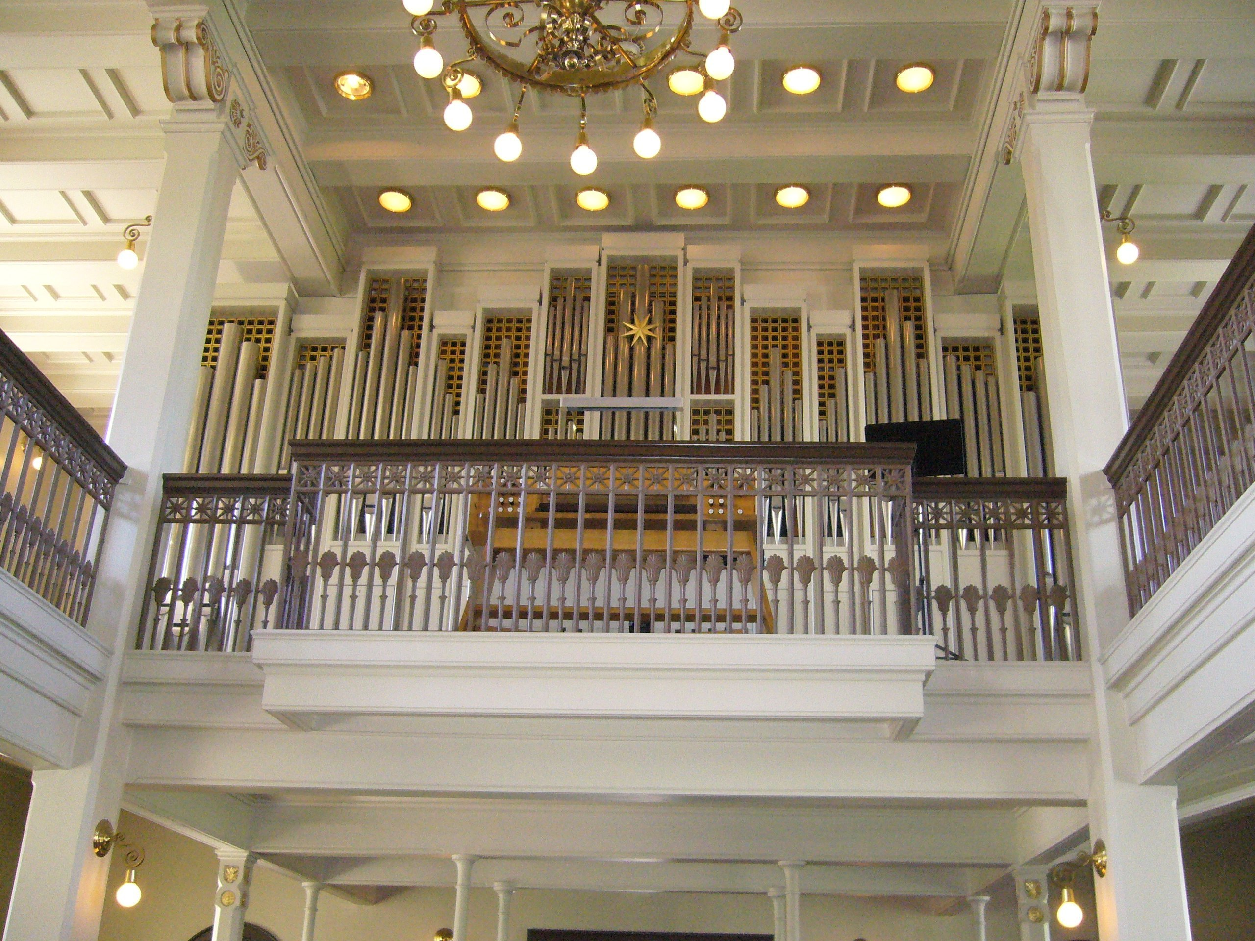 die Berliner Orgel von Karl Schuke in der Domkirche Reykjavik